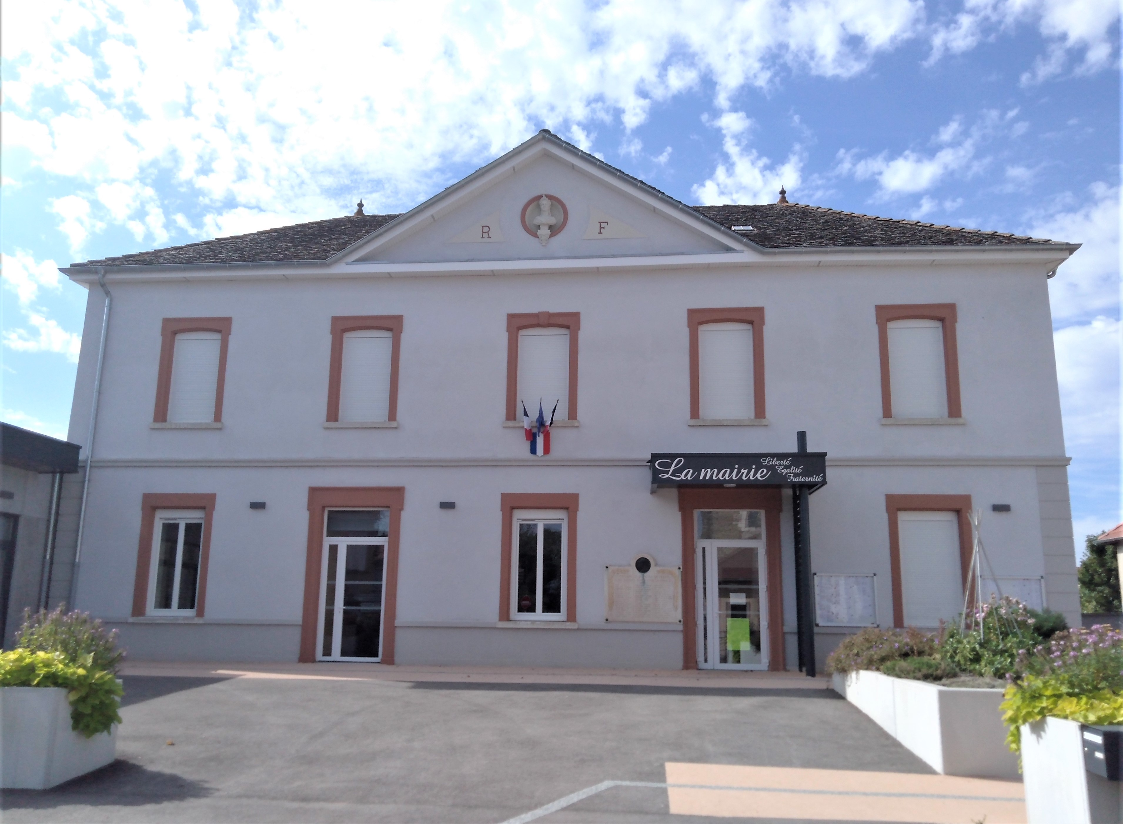 St Victor de Cessieu (mairie) en septembre 2019